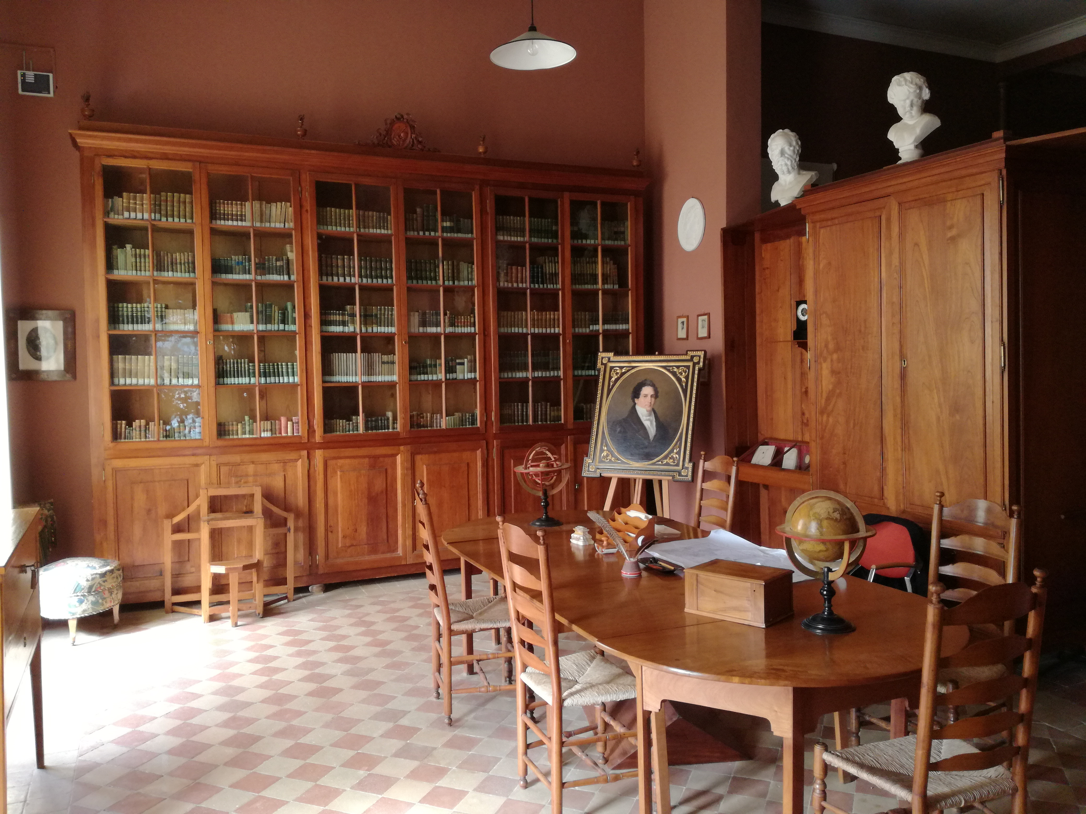 Biblioteca romàntica on destaquen les col·leccions dels romàntics europeus i dels clàssics italians i espanyols.